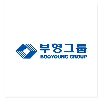 부영그룹 대표 로고이다.